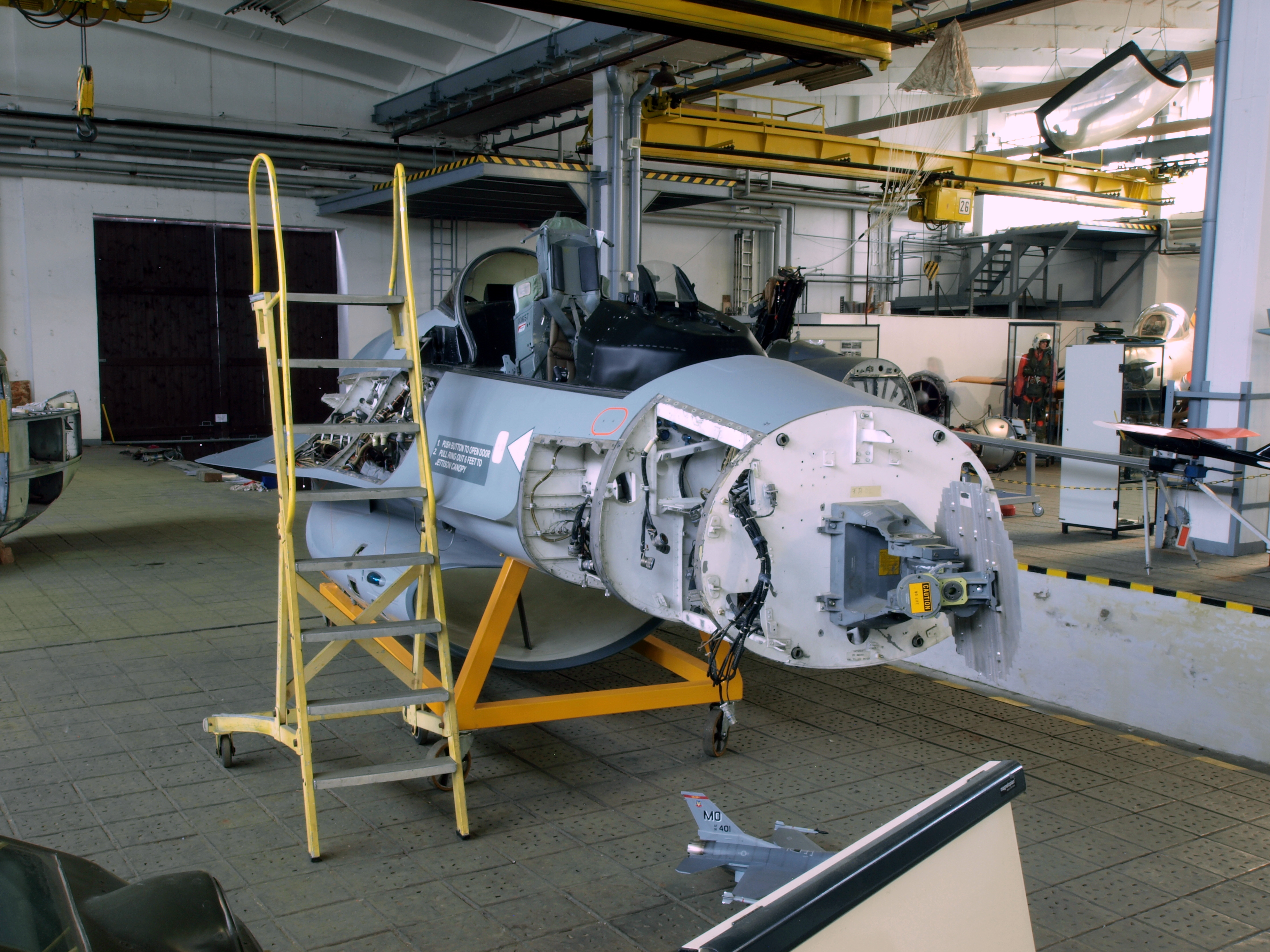 F-16 Cockpit part.